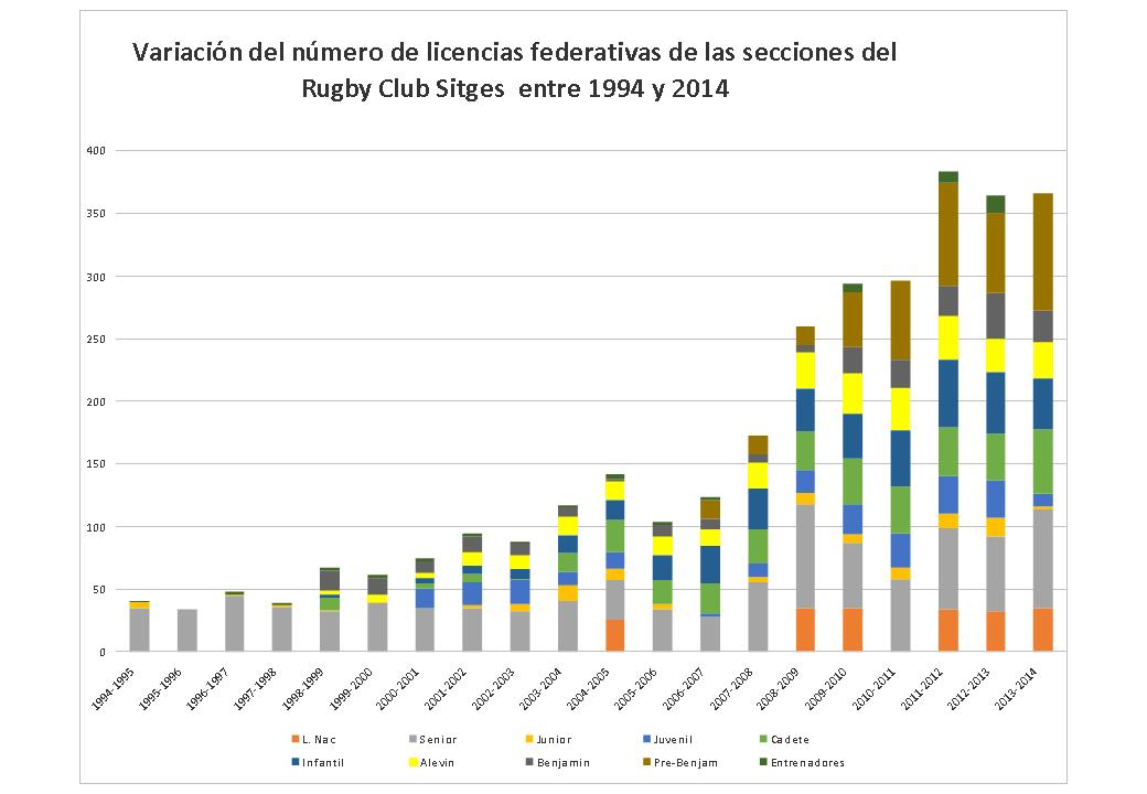 Variación de las licencias en la Federación Catalana de Rugby entre 1994 y 2014 del Rugby Club Sitges